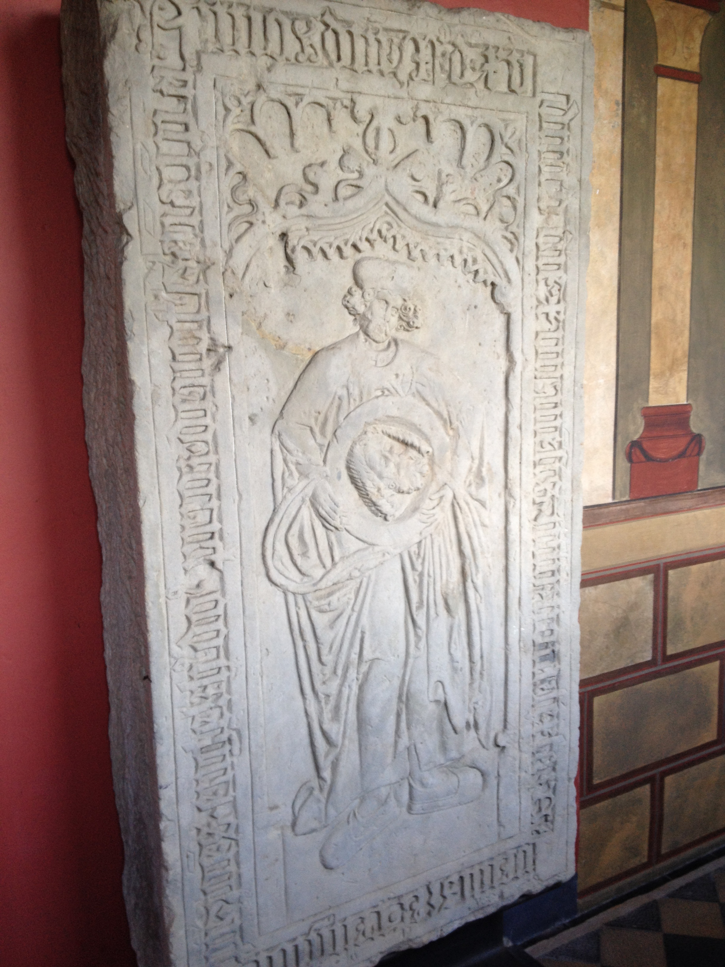 Epitaph des Johanniterpriors Johannes Engel (Goslar 1515)